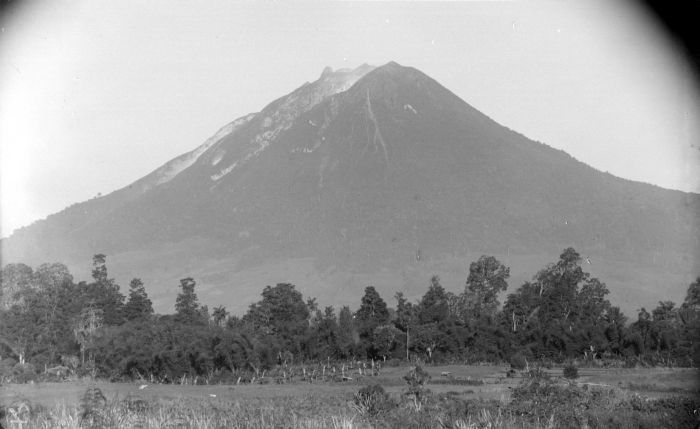 Negatif. Gunung Sinabung di Tanah Karo